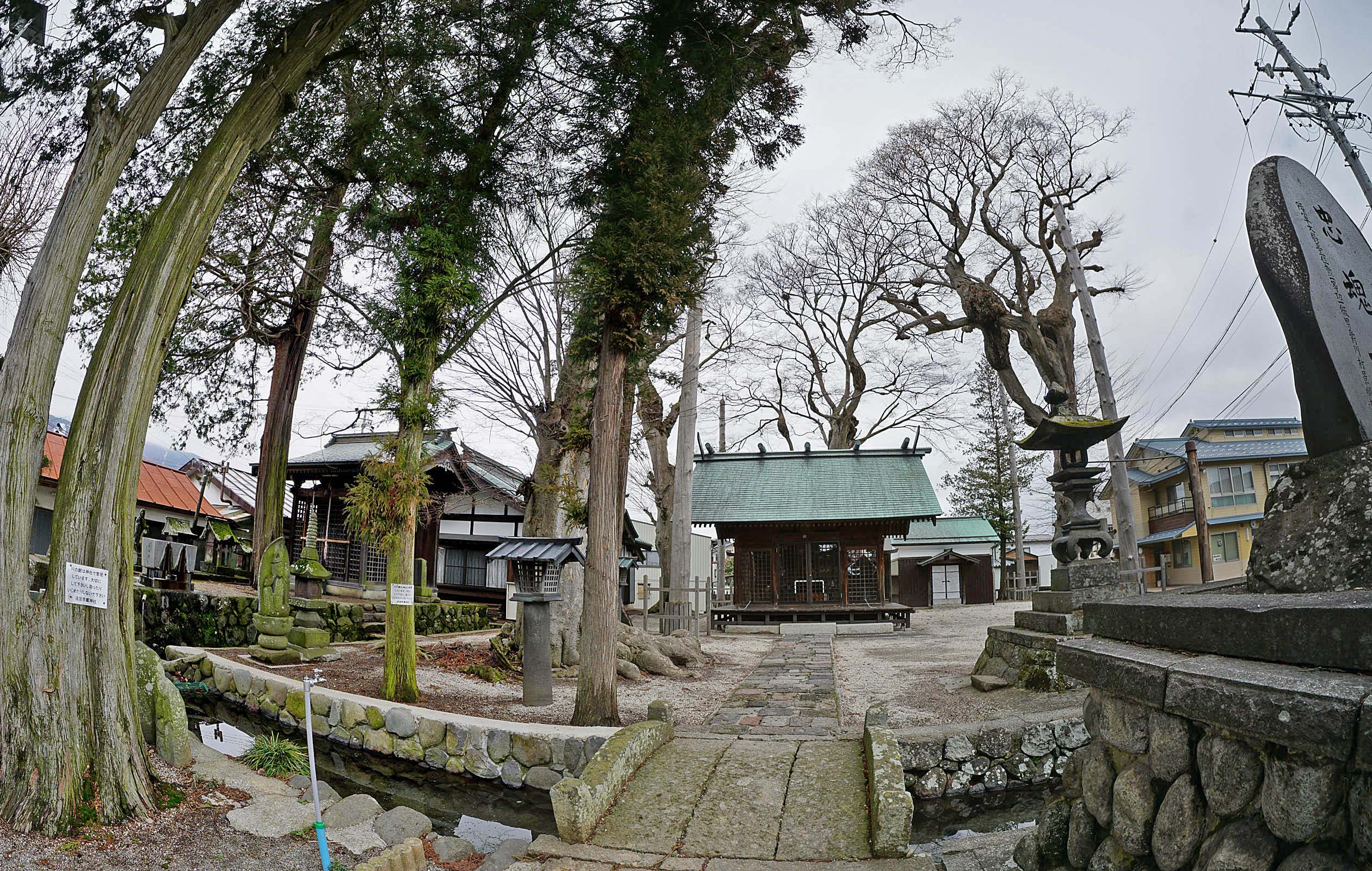 Tatsuya-Sukura Shrine , 達屋酢蔵神社